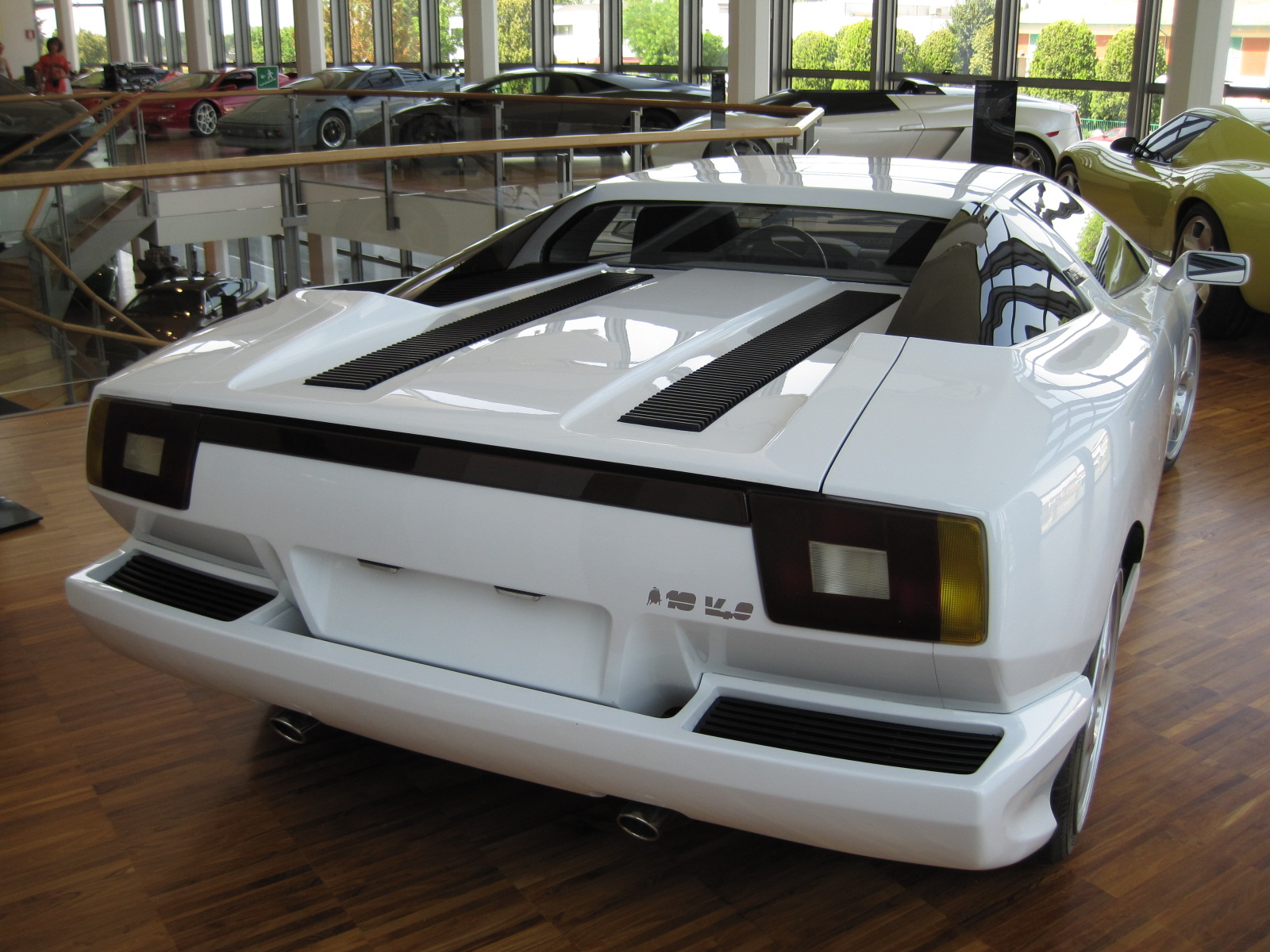 Musée Lamborghini - Prototype P 140 - V10 - 1988